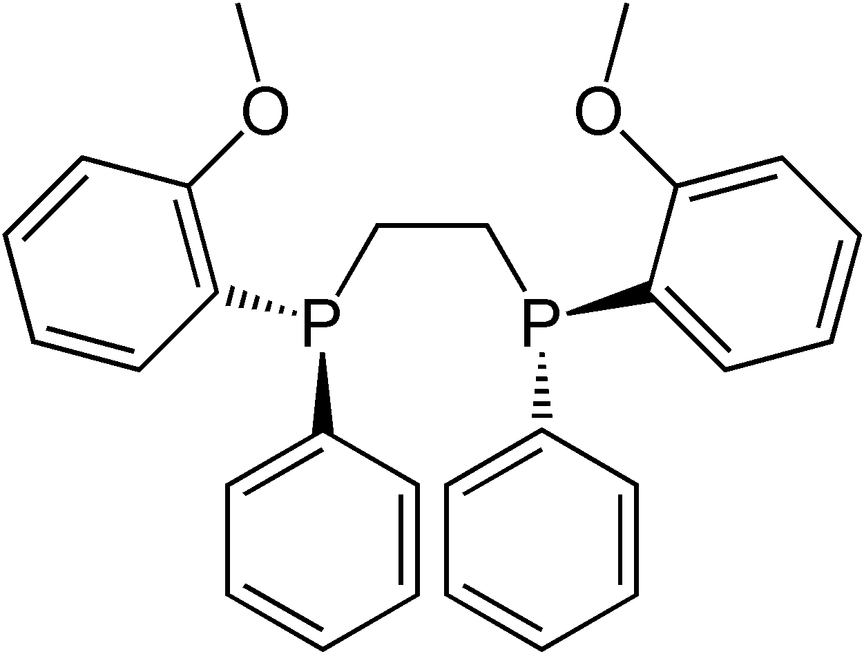 Struktur von DIPAMP